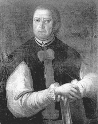 Portret Jędrzeja Kitowicza nieznanego autorstwa